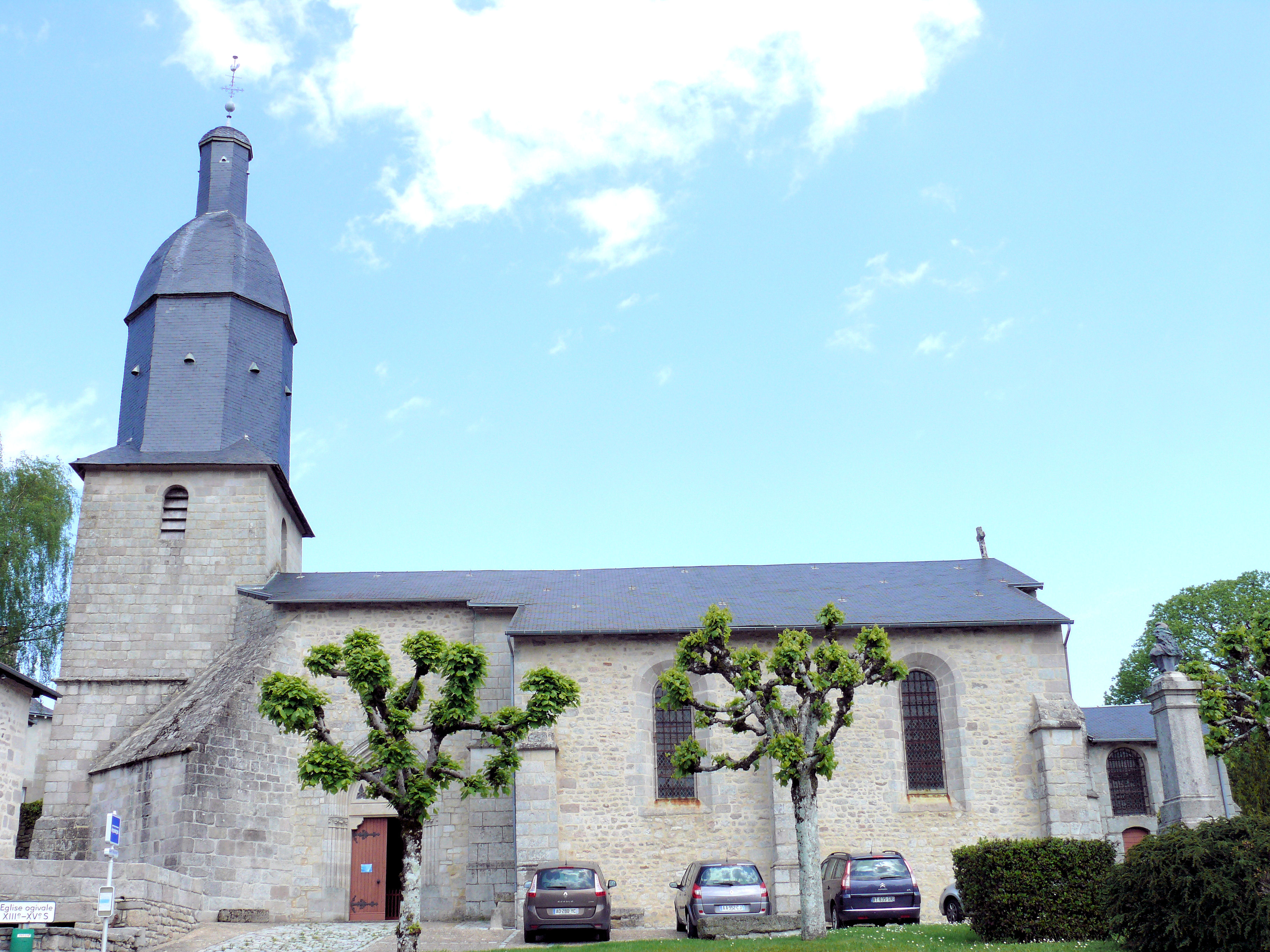 Saint-Sylvestre (Haute-Vienne) - Eglise